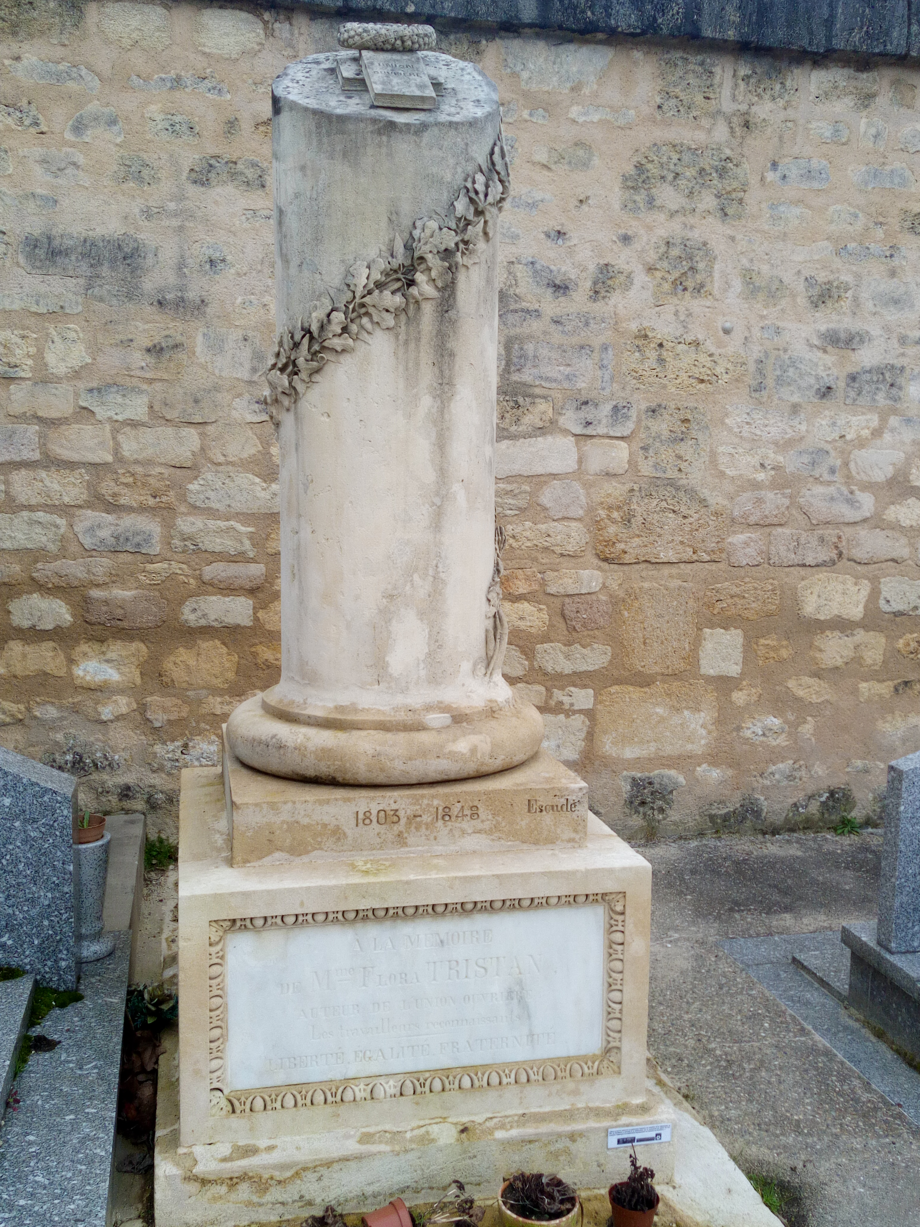 Tombe de Flora Tristan au Cimetière de la Chartreuse à Bordeaux Allée Camille Godard